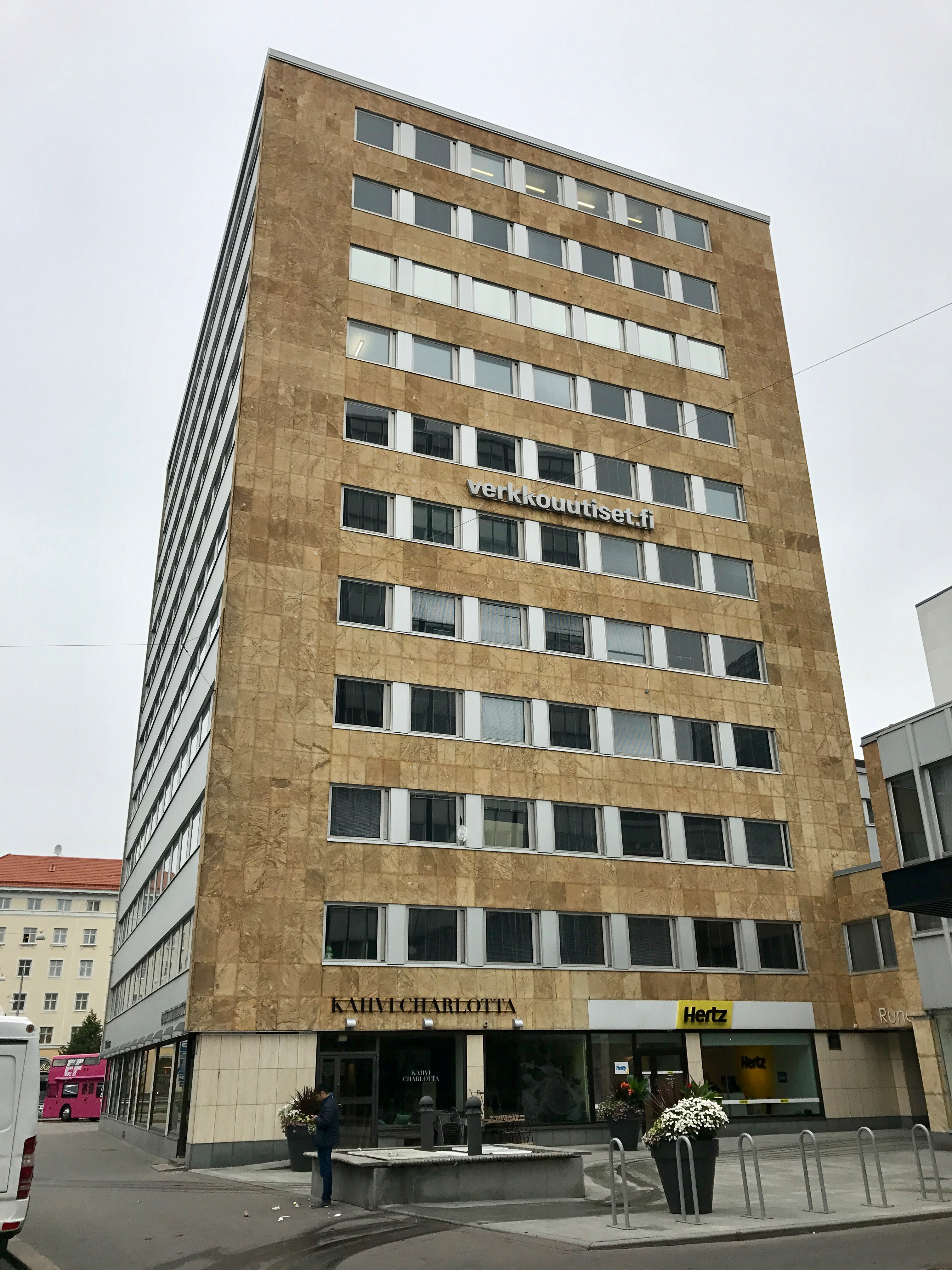 Autotalon pohjoisosan liiketalo Helsingin Kampissa, Runeberginkatu.